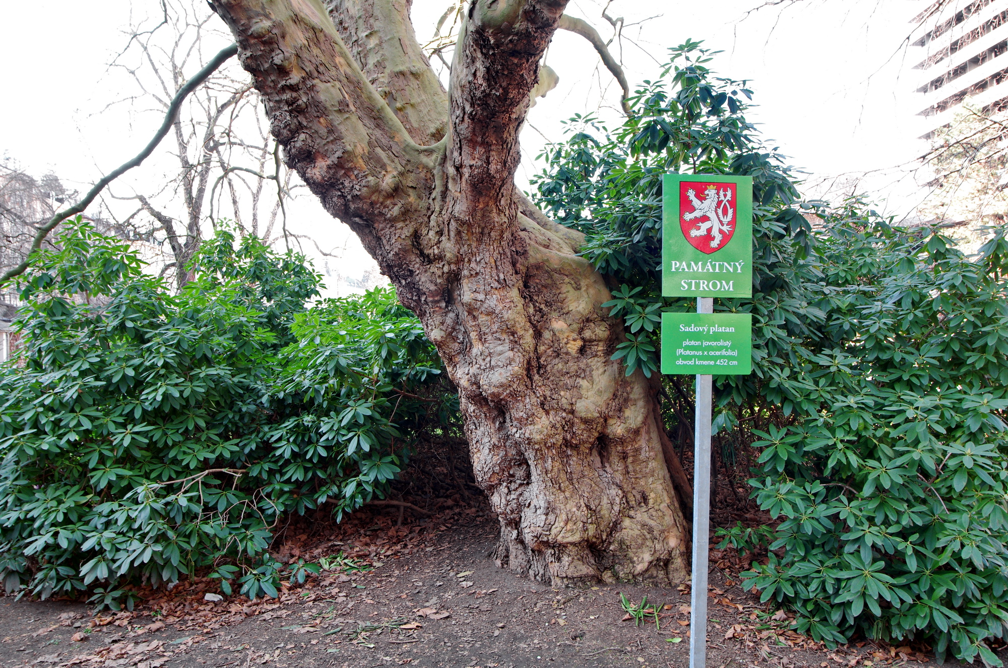 památný strom Sadový platan v Dvořákových sadech v Karlových Varech